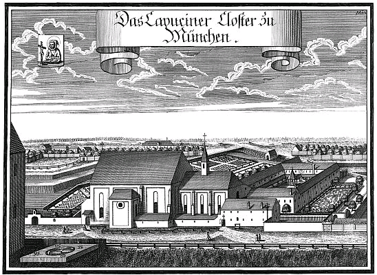 Kupferstich des Kapuzinerklosters in München von Michael Wening